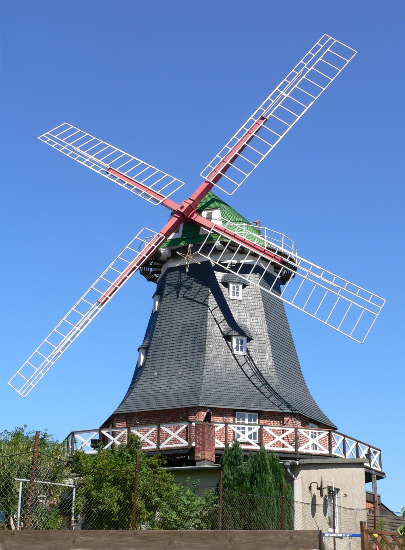 "Versenkbare" Erdholländer-Windmühle in Kröpelin